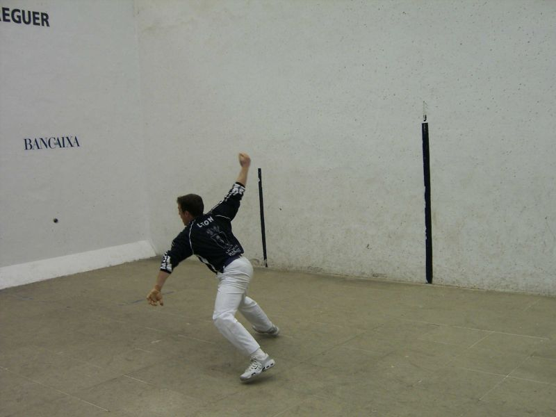 Pic of León (Rafael Soler Tomás) playing a "Escala i corda" game and getting ready to hit a bouncing ball from the "rest" field. Imatge de León jugant una partida d'escala i corda tornant una pelota al rebot al rest